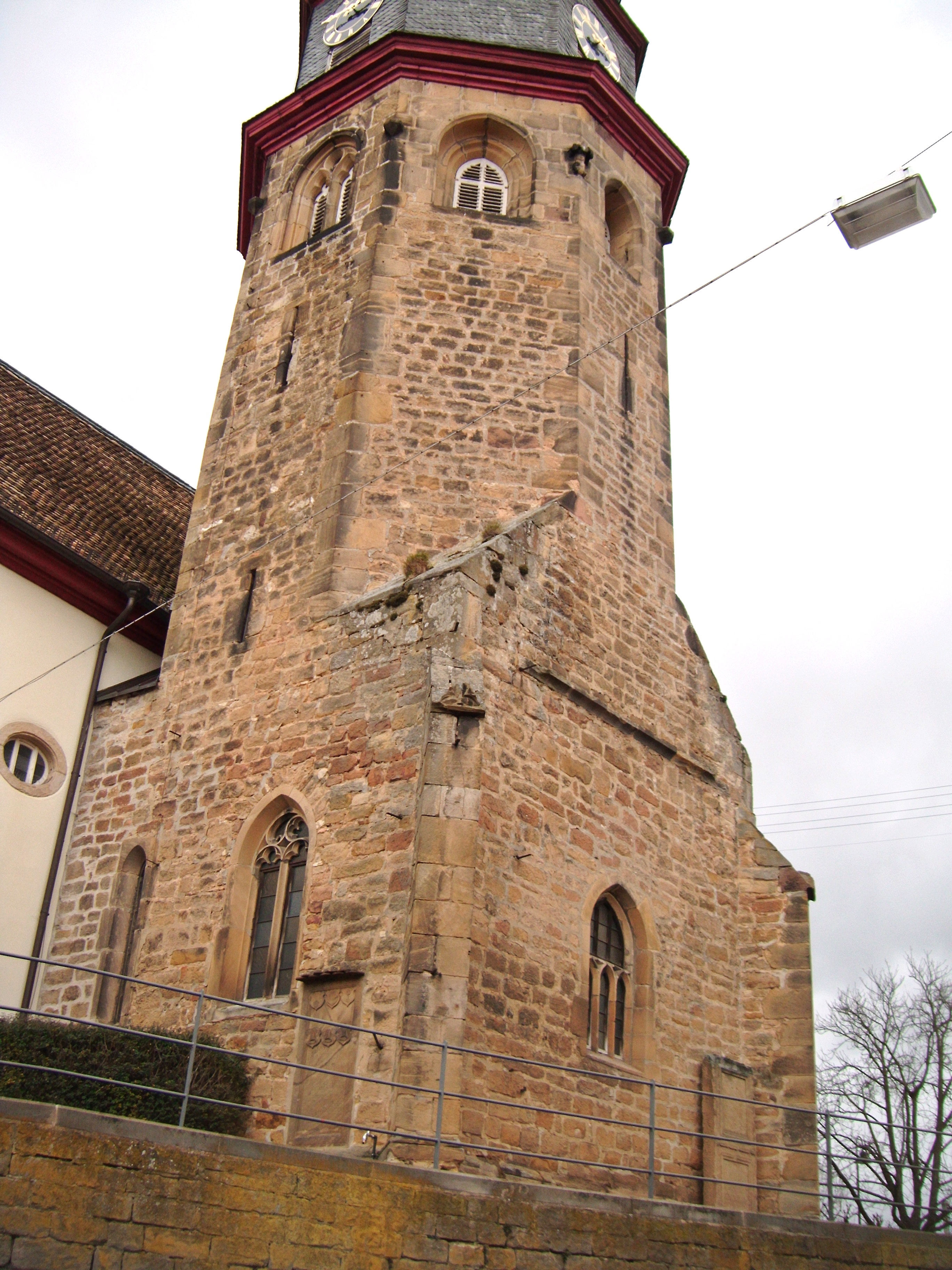 Gotischer Chorturm der Protestantischen Salvatorkirche Kallstadt, Rheinland-Pfalz